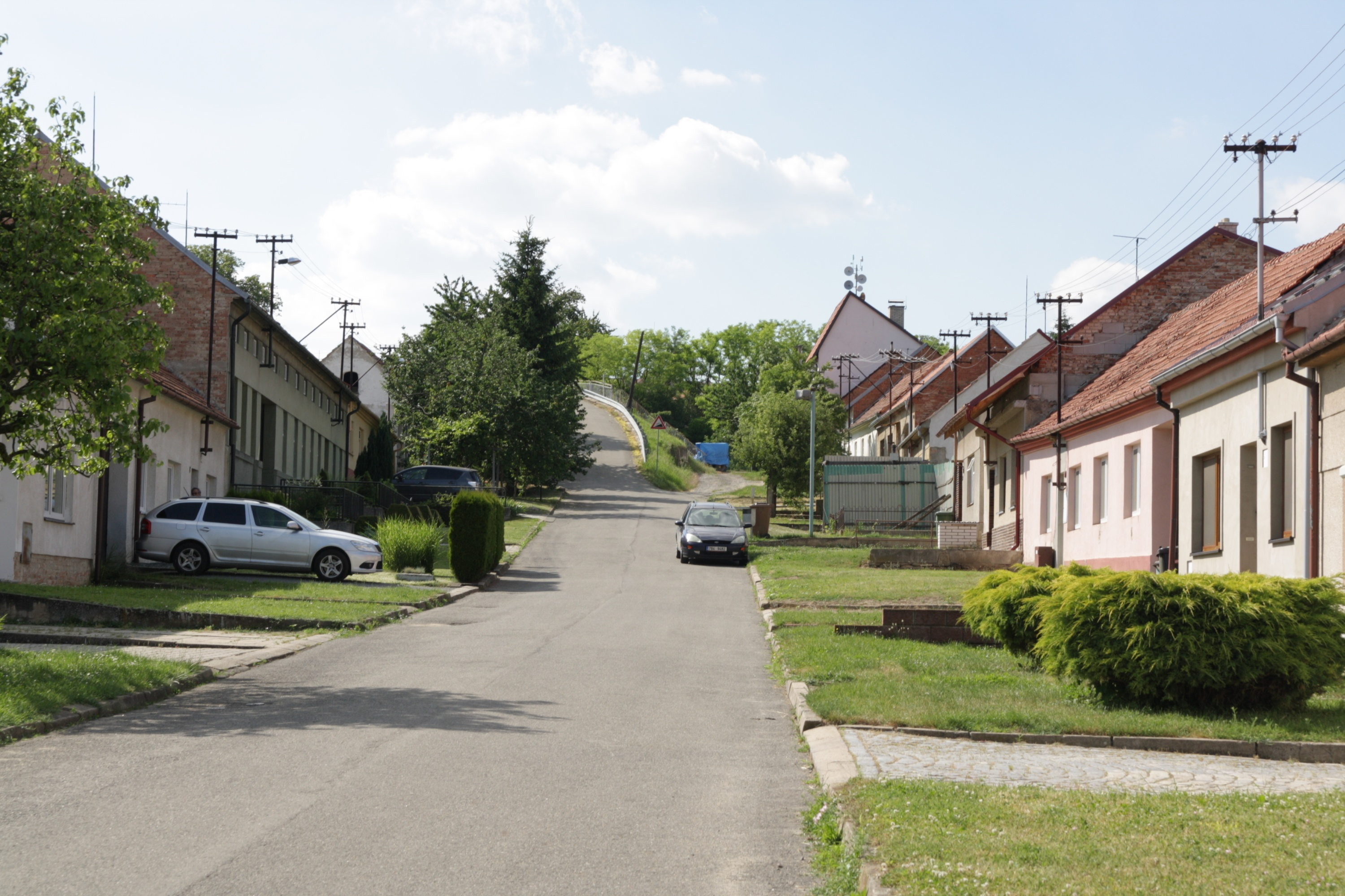 Hostěrádky-Rešov - ulice u nadjezdu.